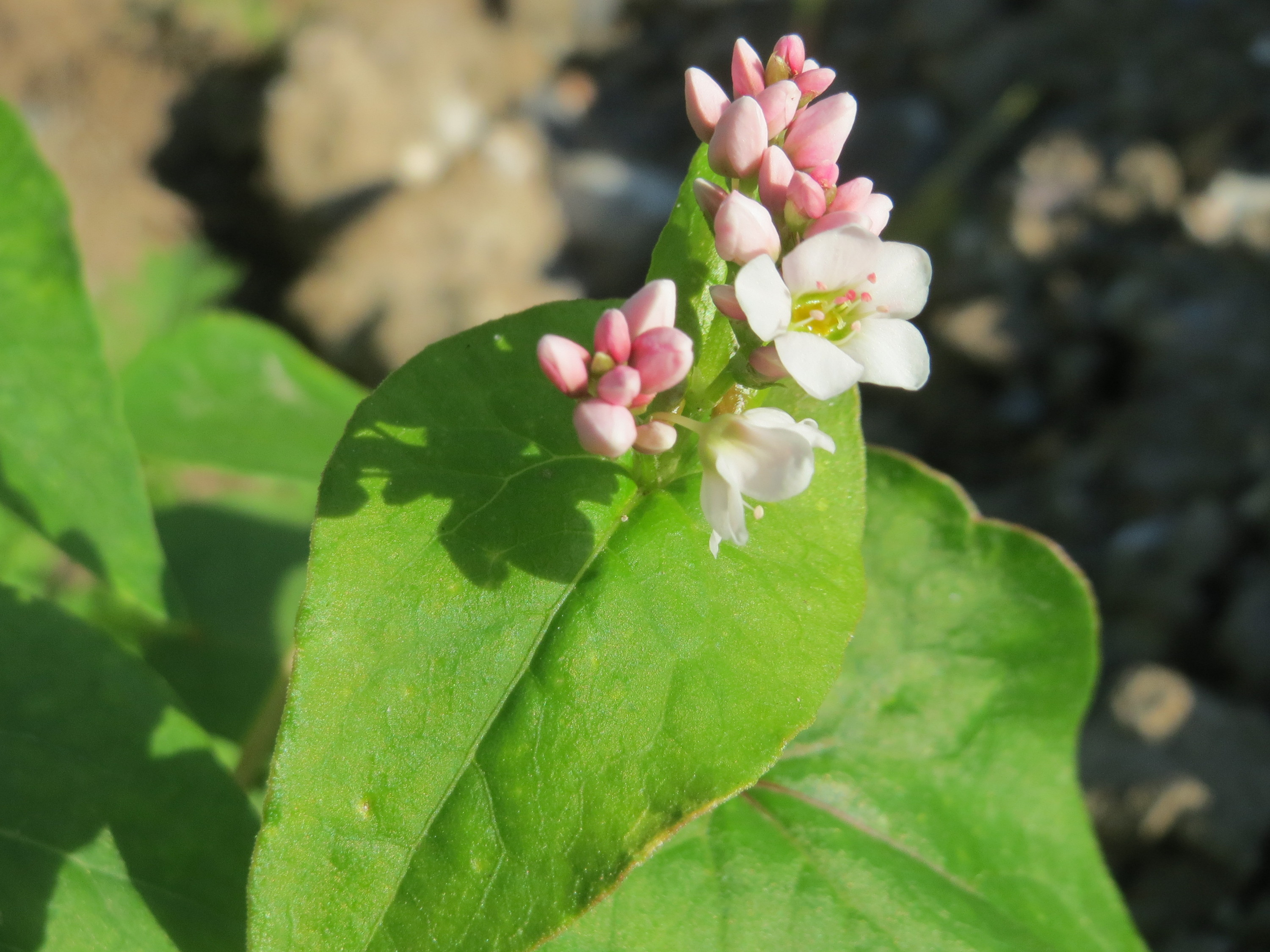 Verwilderter Buchweizen (Fagopyrum esculentum) bei Reilingen